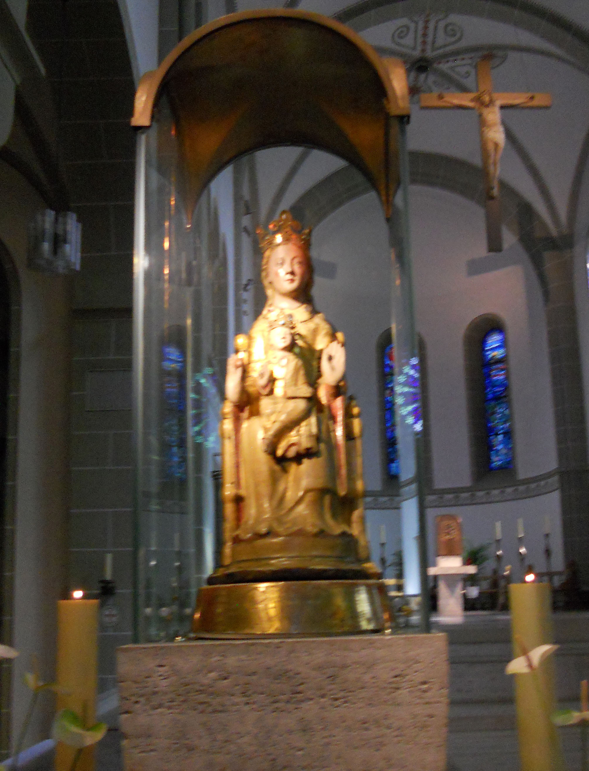 Ansicht des Gnadenbildes in der Wallfahrtskirche Werl